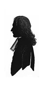 Silhouet van Helperus Ritzema van Lier